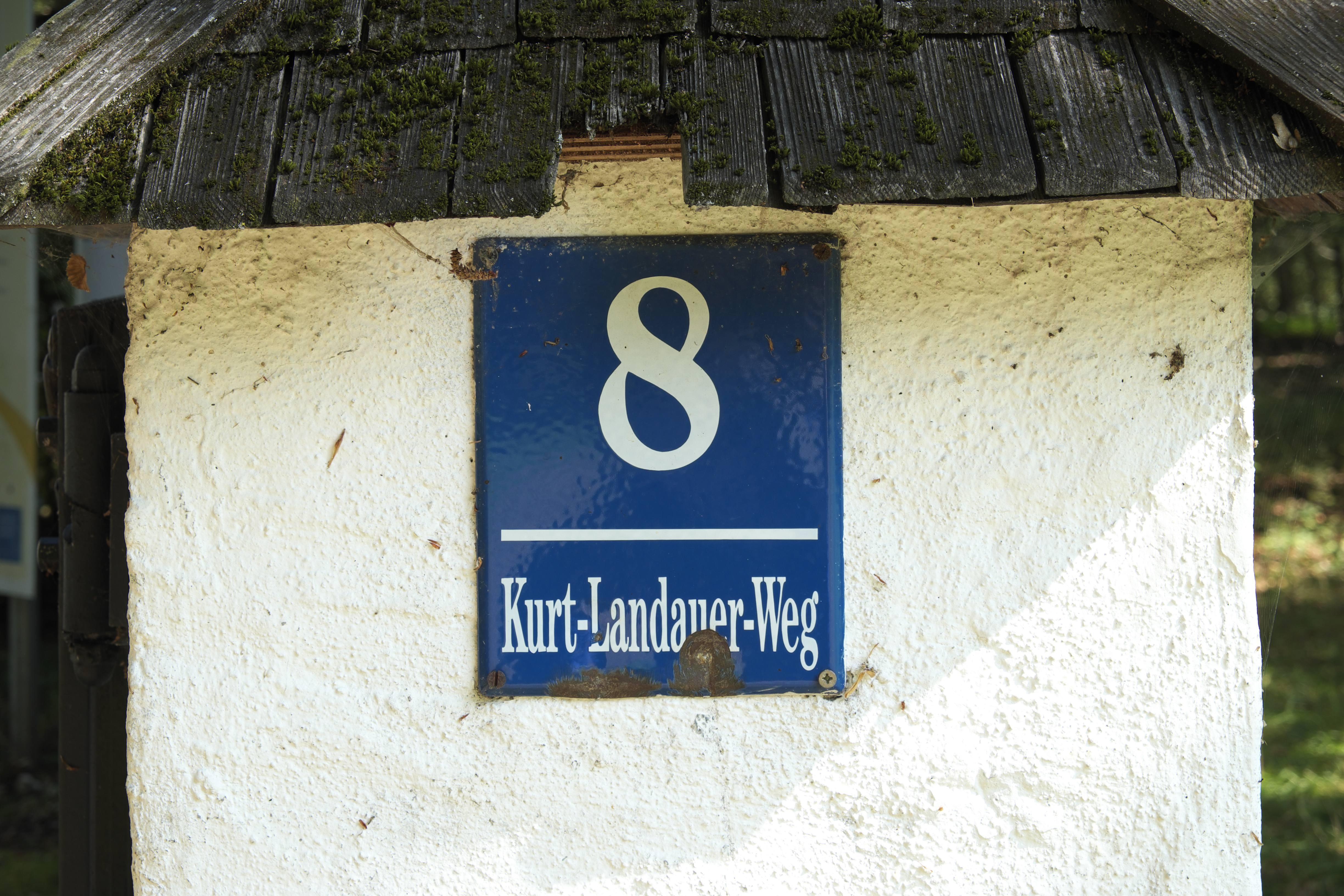 Straßenschild Kurt-Landauer-Weg bei der katholischen Filialkirche Heilig Kreuz in Fröttmaning im Stadtbezirk Schwabing-Freimann in München (Bayern/Deutschland)